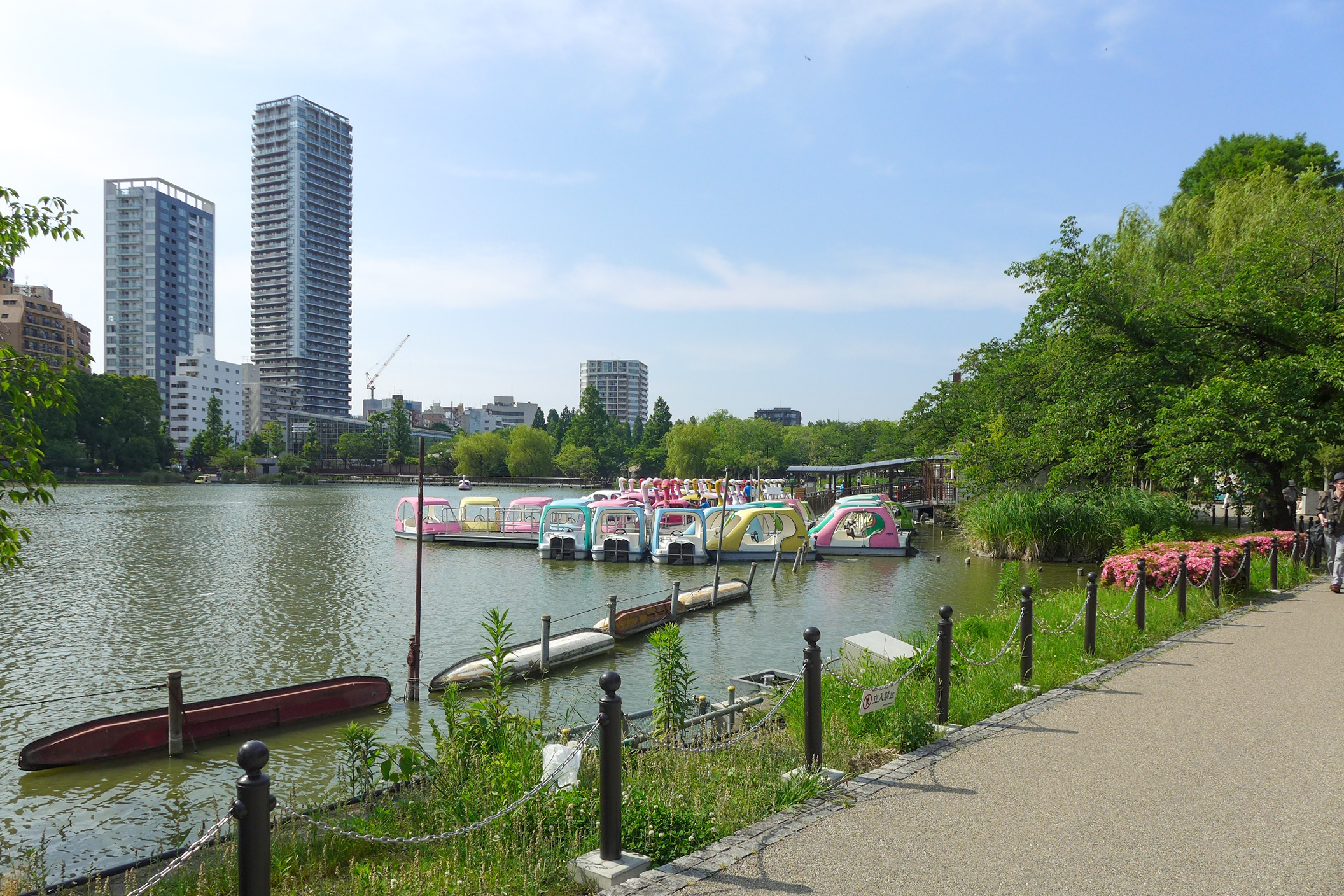 Ueno Shinobazu No Ike